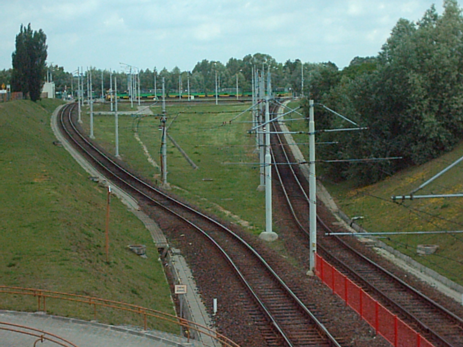 Dawna pętla PST, Poznań